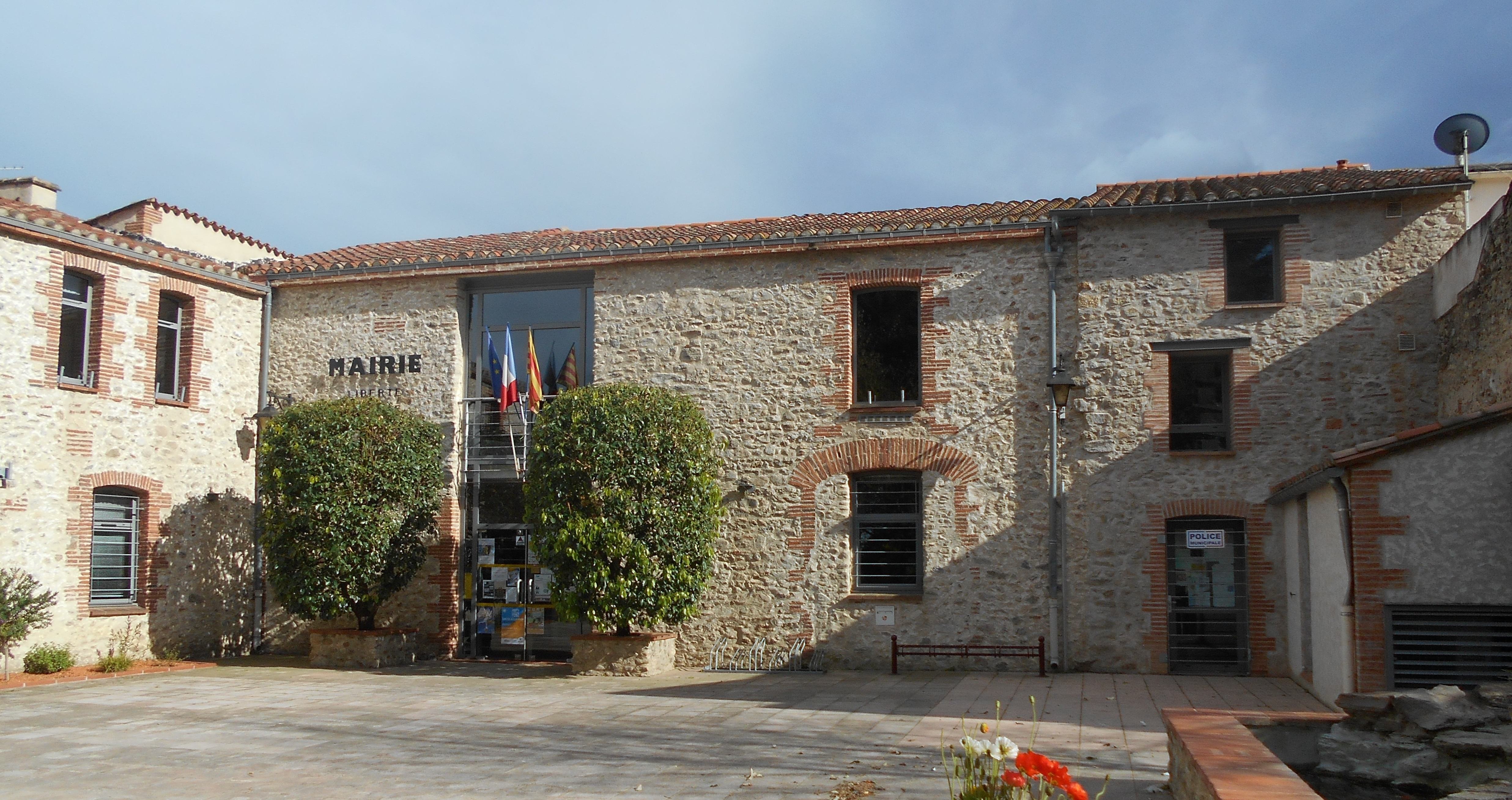 La Casa del Comú de Sant Andreu de Sureda